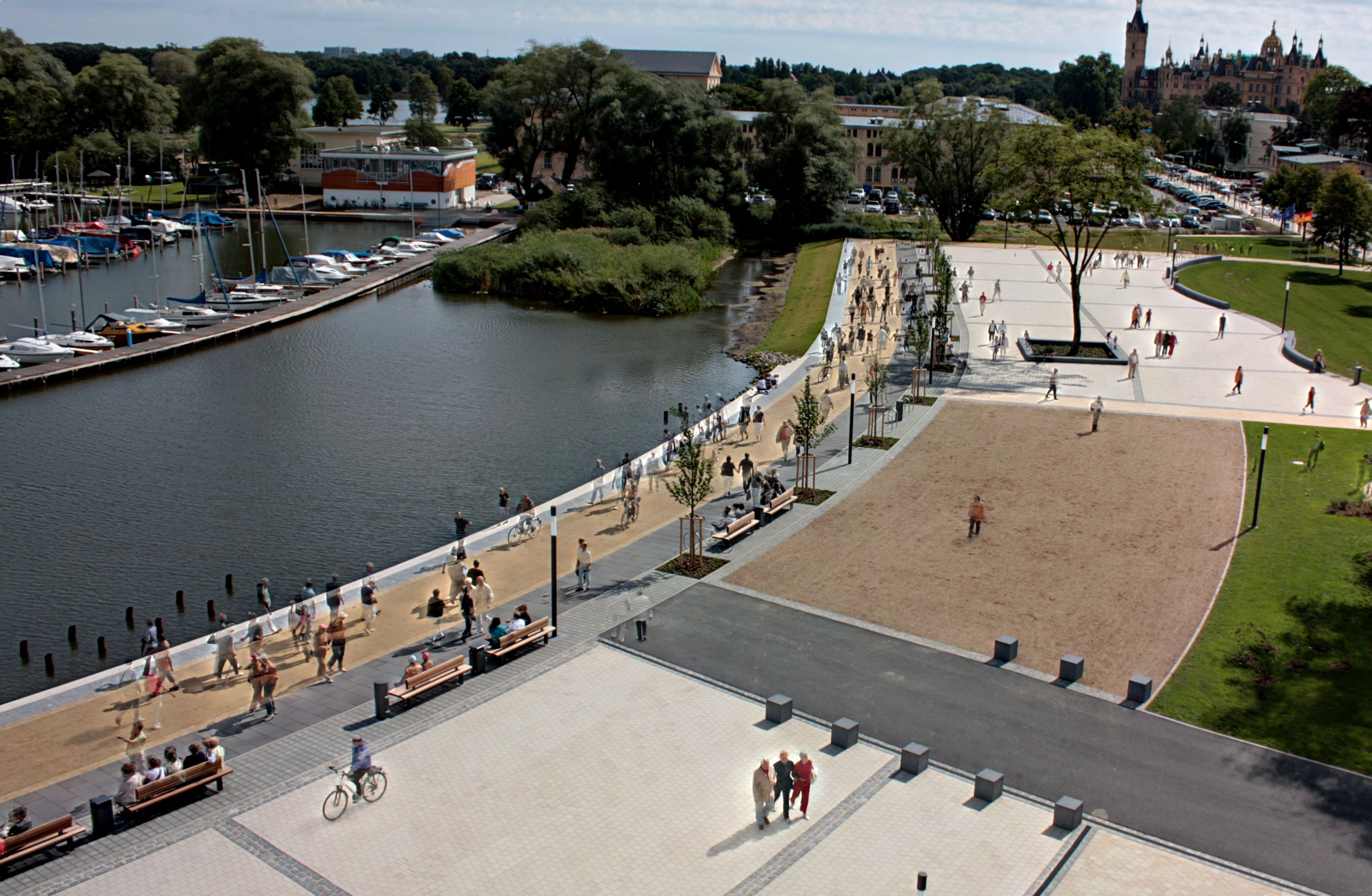 12 images stacked